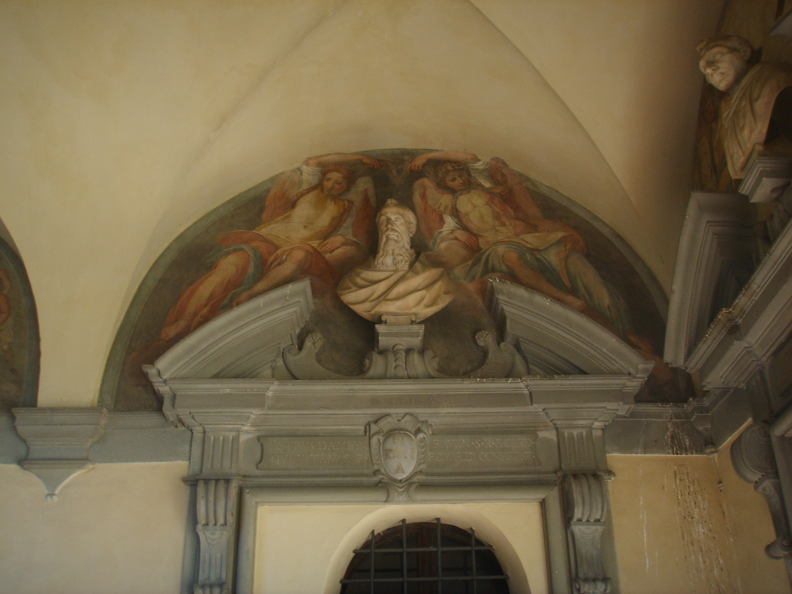 Santa Maria degli Angeli (Florence) lunetta del chiostro della sacrestia decorato con: Anonimo, Busto di san Pier Damiani; Pietro Francavilla, angeli.